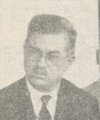 Ramón Indalecio Cardozo